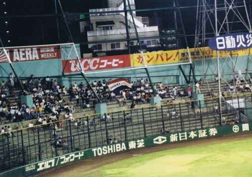 川崎球場ライト側スタンド